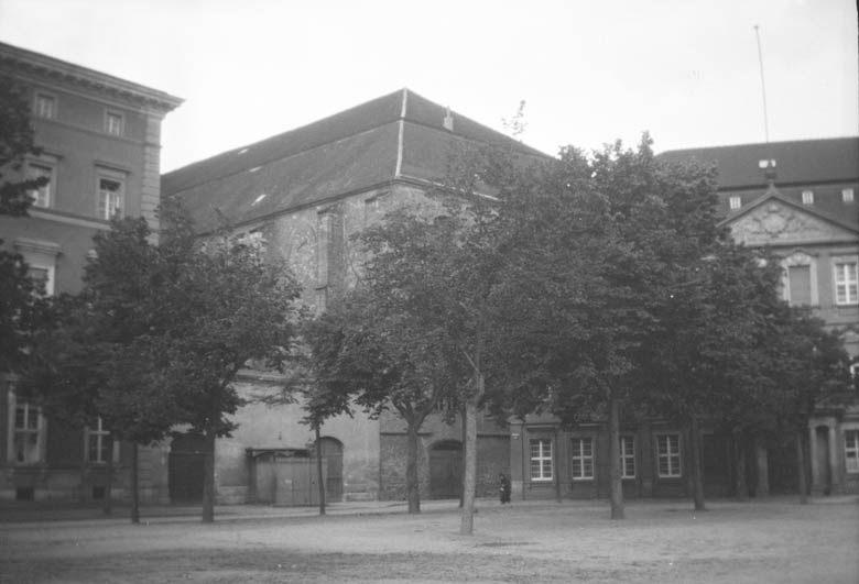 Ödekyrka vid Domplatz Motiv: Magdeburg Kategori: Stadsmiljö, (01) Exteriörer Ödekyrka vid Domplatz.